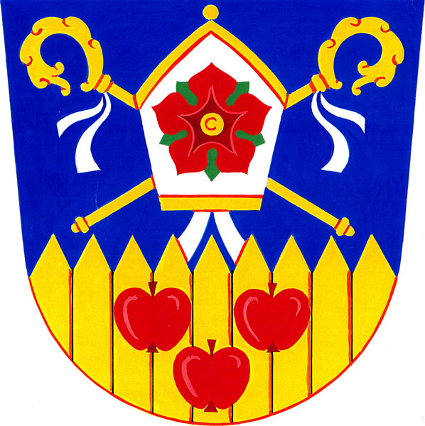 Znak obce Újezd, okres Zlín.